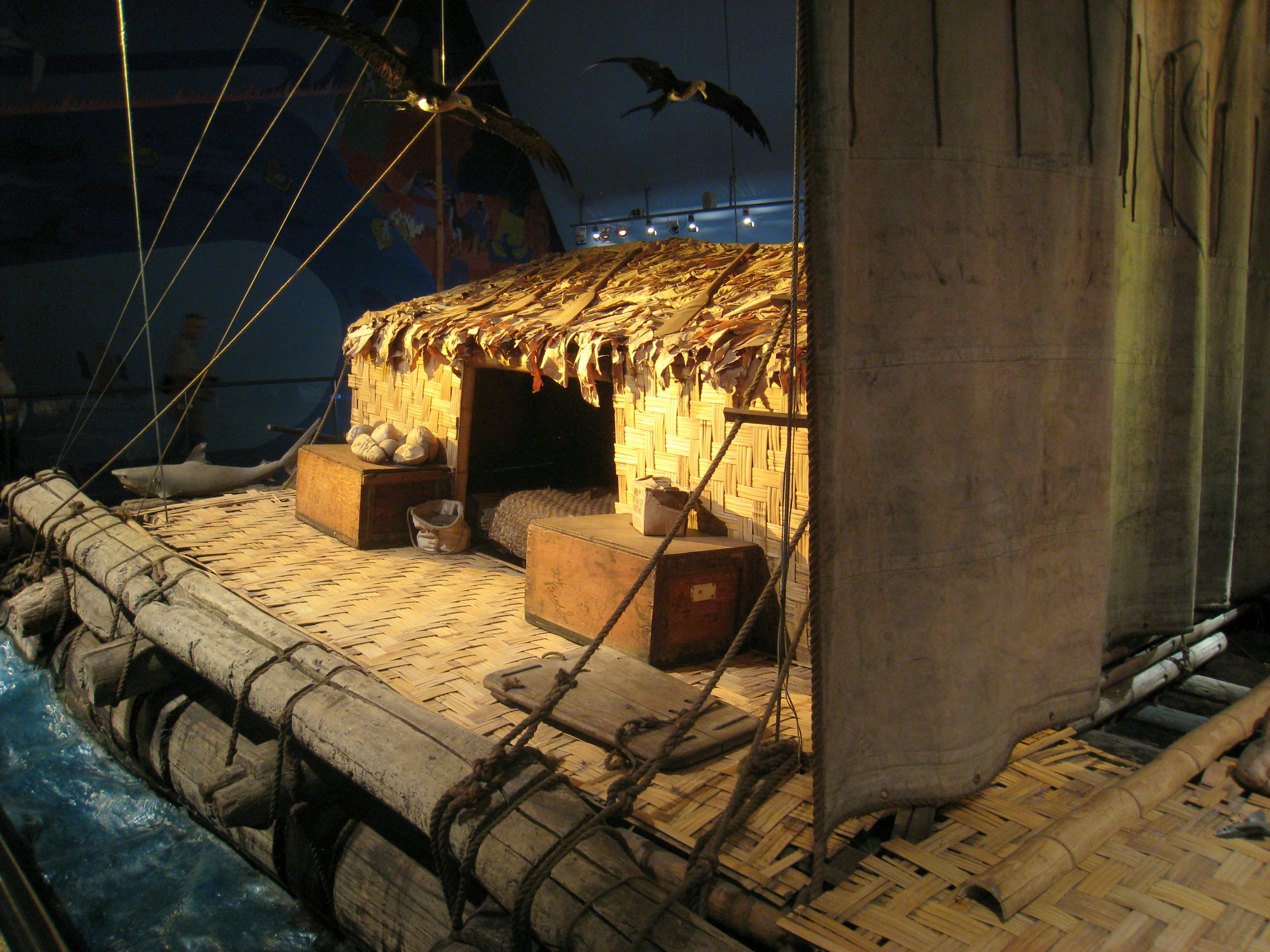 Kon-Tiki raft, in Kon-Tiki Museum, Oslo, Norway.